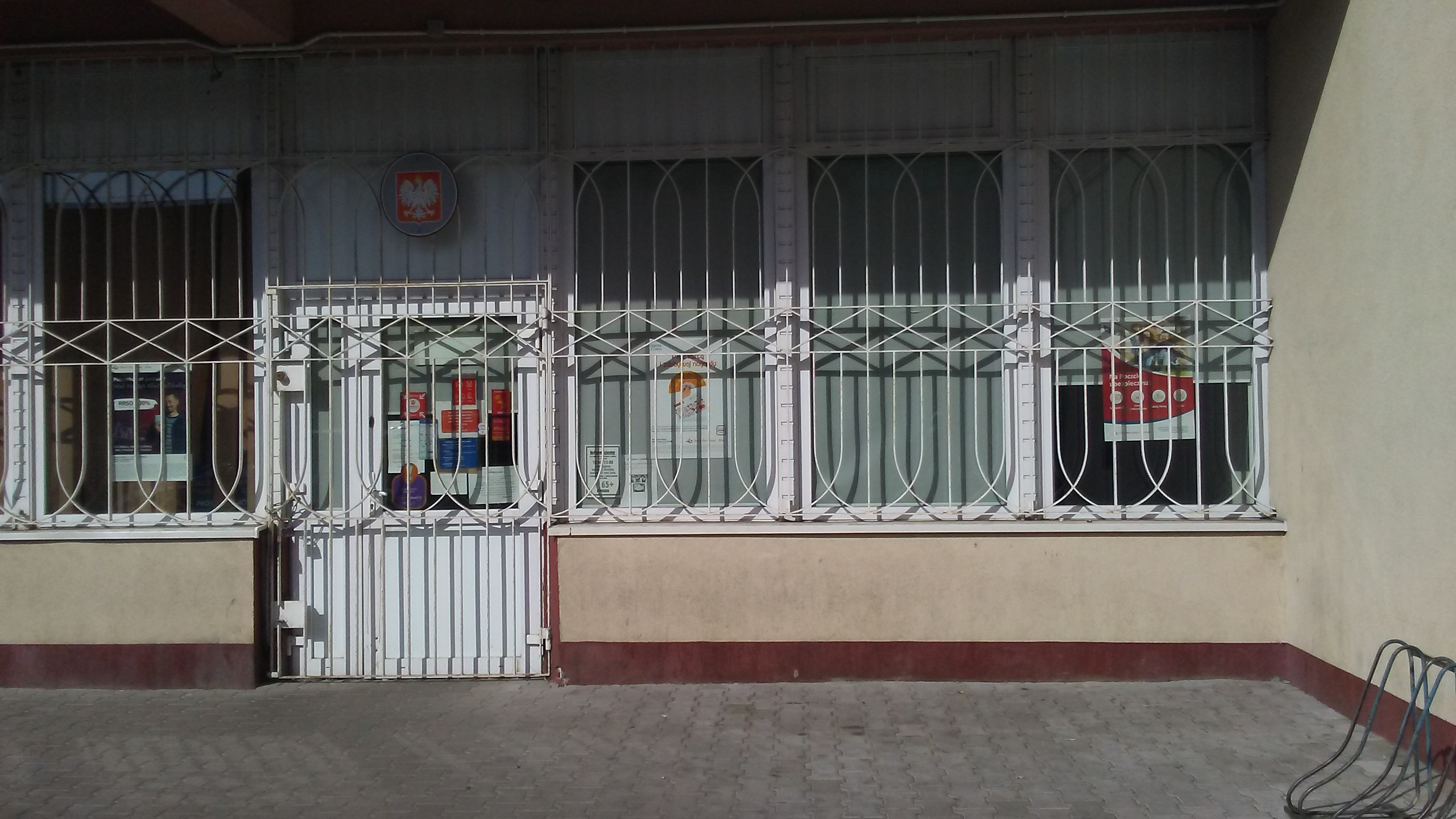 Osiedlowy urząd Poczty Polskiej na największym tomaszowskim osiedlu mieszkaniowym – Niebrowie w Tomaszowie Mazowieckim